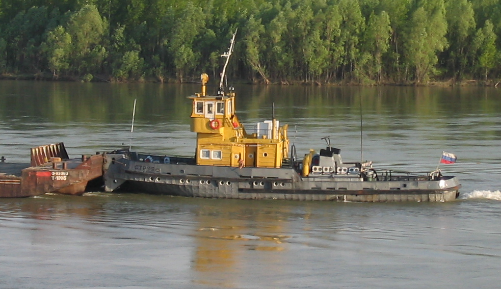 Буксирный теплоход РТ проекта 911Б